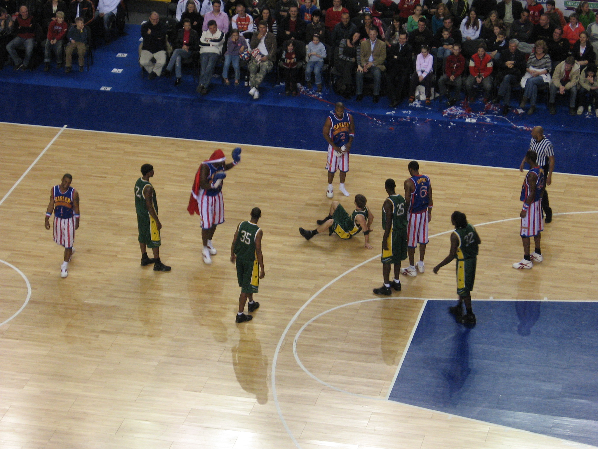 Steel Aréna Košice, 26. február 2008, Harlem Globetrotters